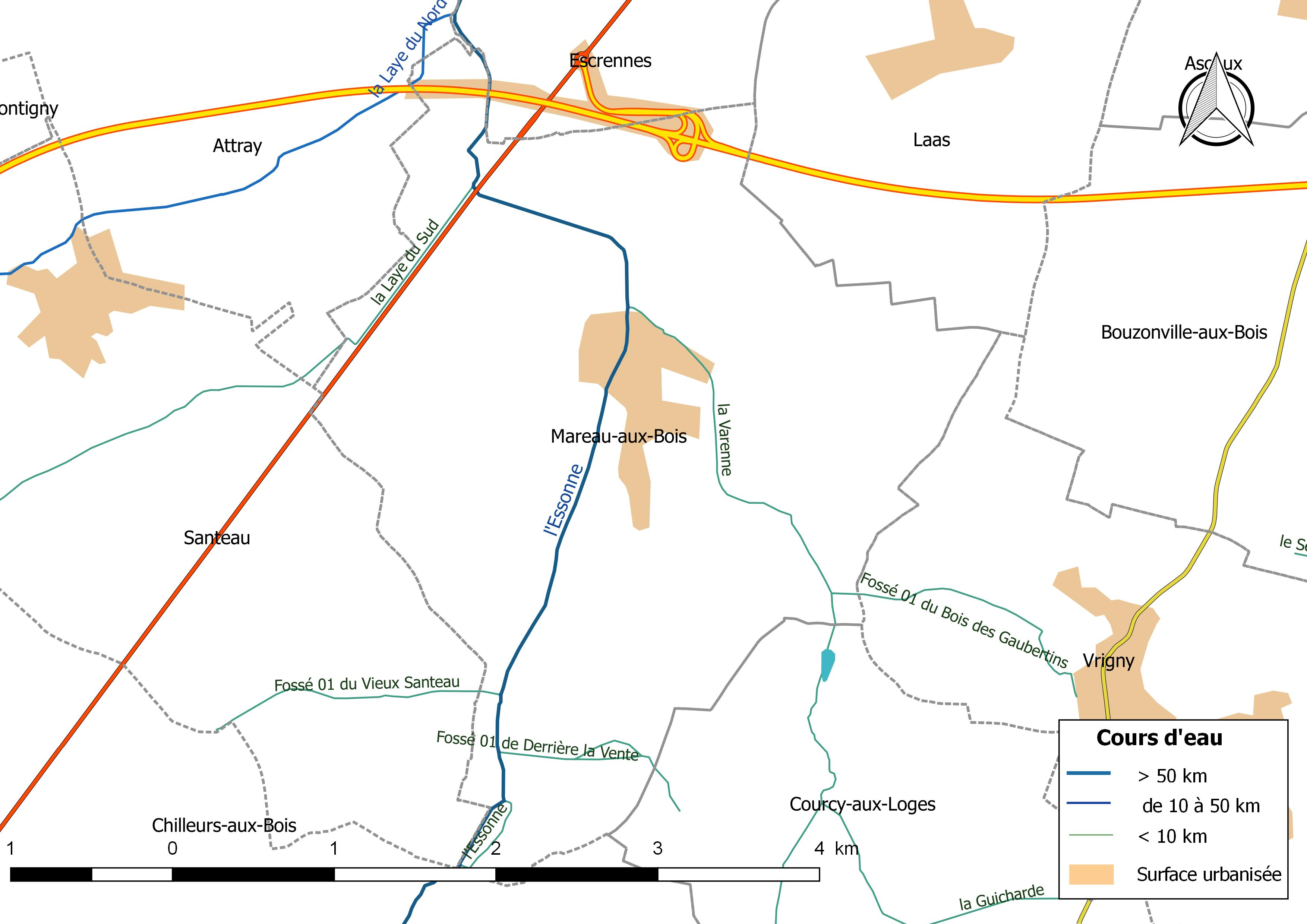 Carte du réseau hydrographique de la commune de Mareau-aux-Bois (France).